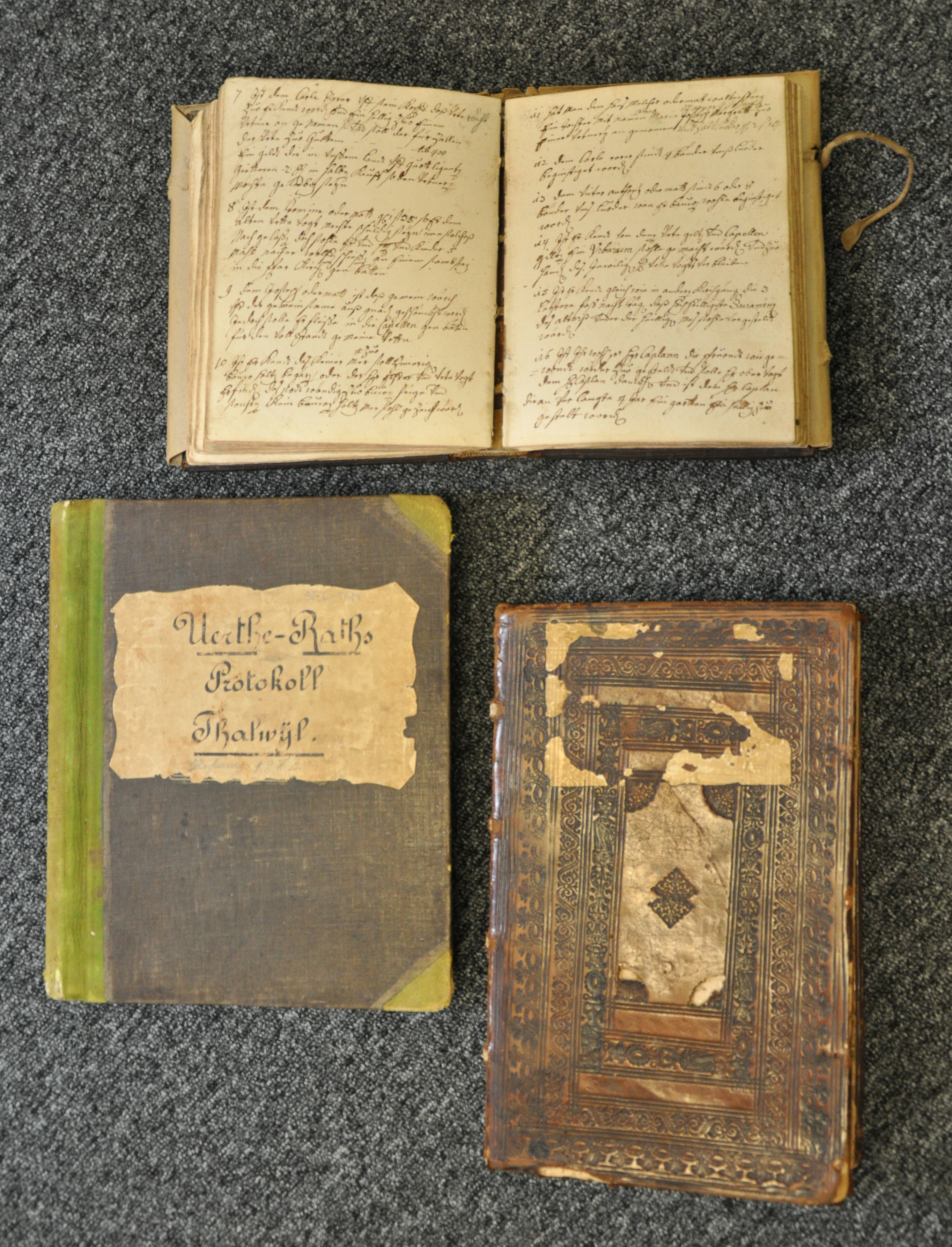 3 der über 40 Protokoll-, Gesetz-, Rechnungs- und Marchenbücher der Ürtekorporation Dallen von 1493 - 1976. Oben links: Ürteratsprotokoll (1882-1890), oben rechts: Abschrift altes Ürteprotokoll (1638-1806), unten: Ürtegemeindeprotokoll (1722-1757). Staatsarchiv Nidwalden SF 6-1. Foto: Nadia Christen, Staatsarchiv Nidwalden.